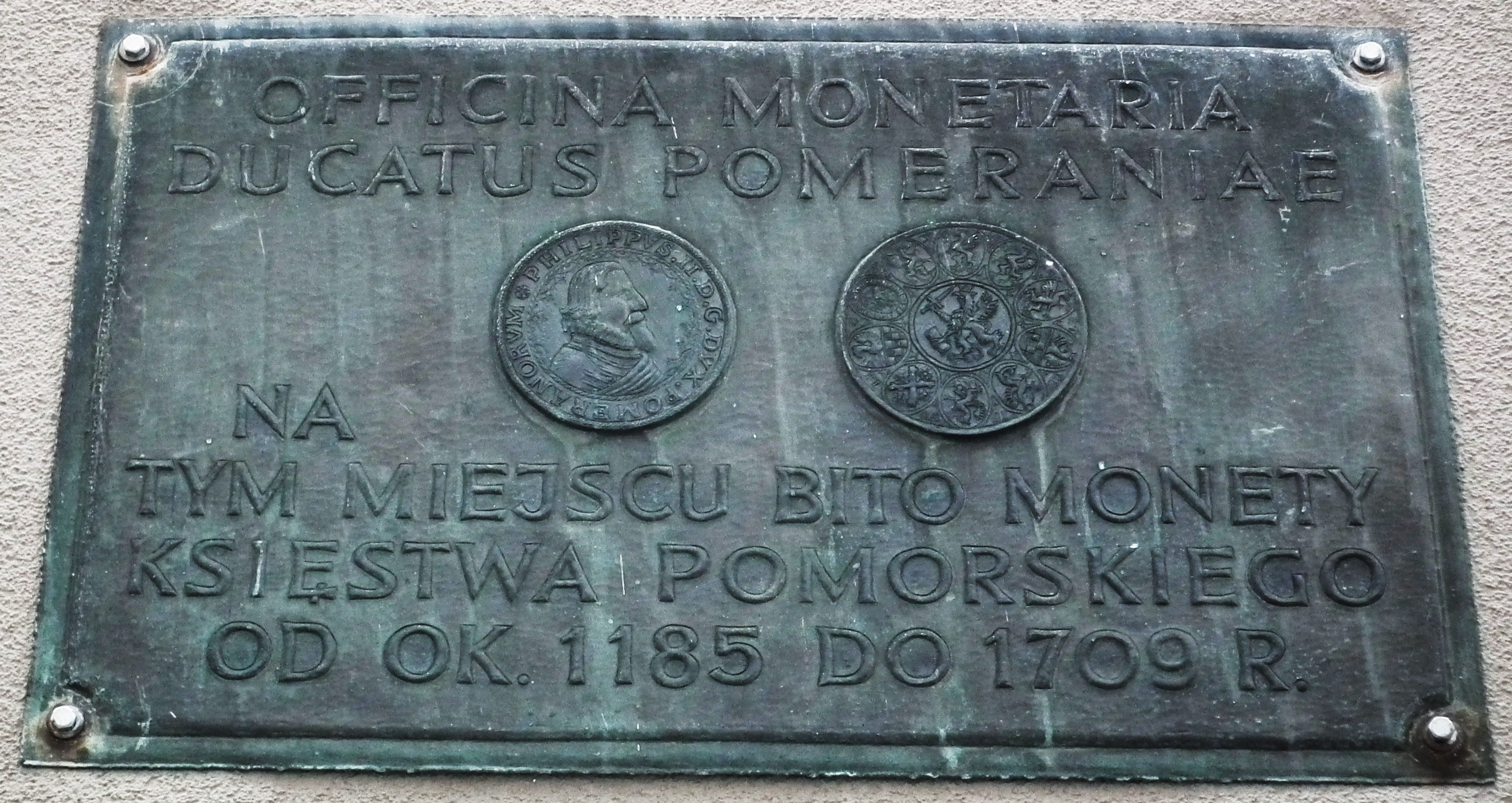 Tablica pam. w Szczecinie koło zamku.